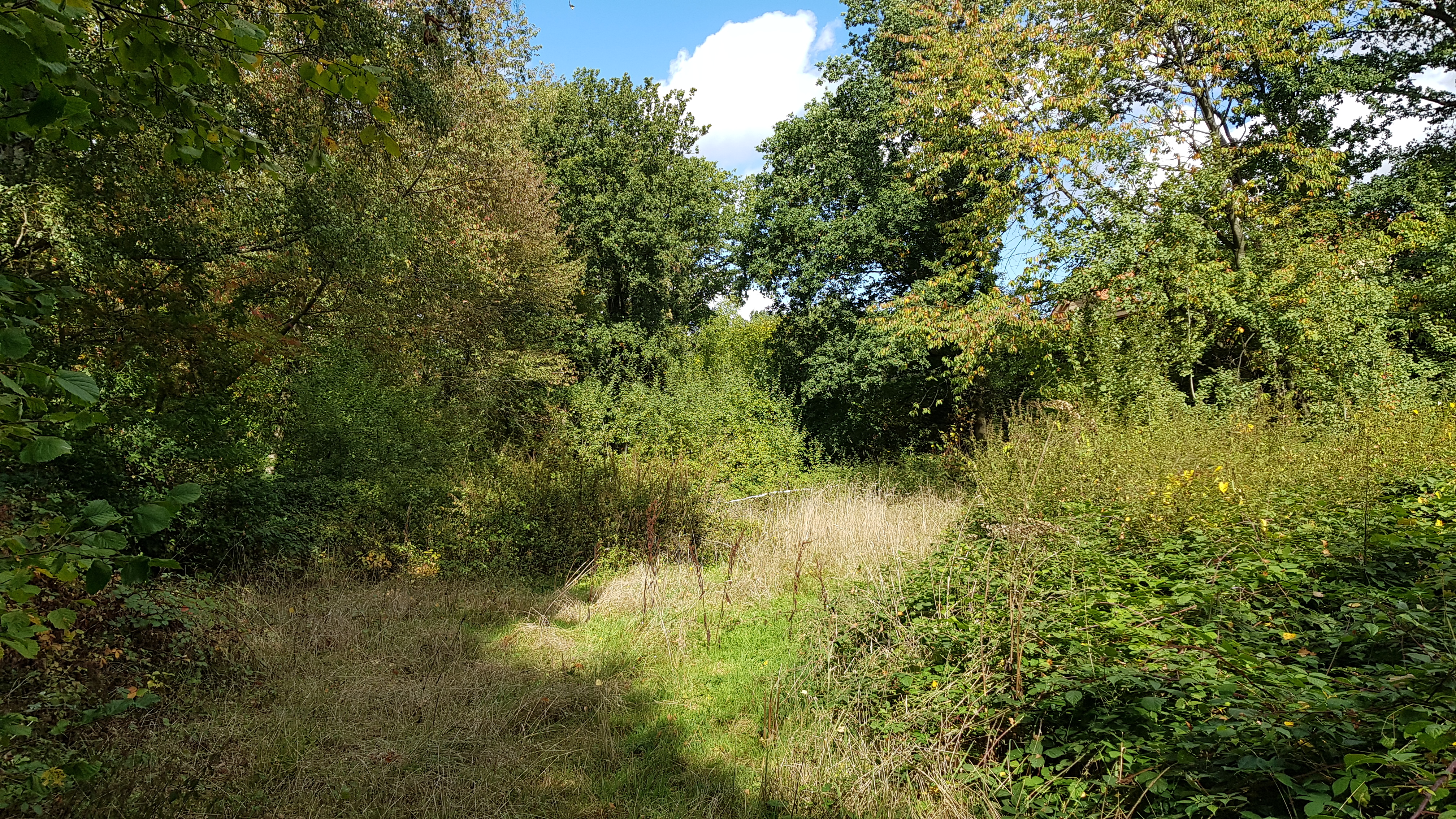 Groeve Crapoel, Crapoel, Gulpen-Wittem, Nederland